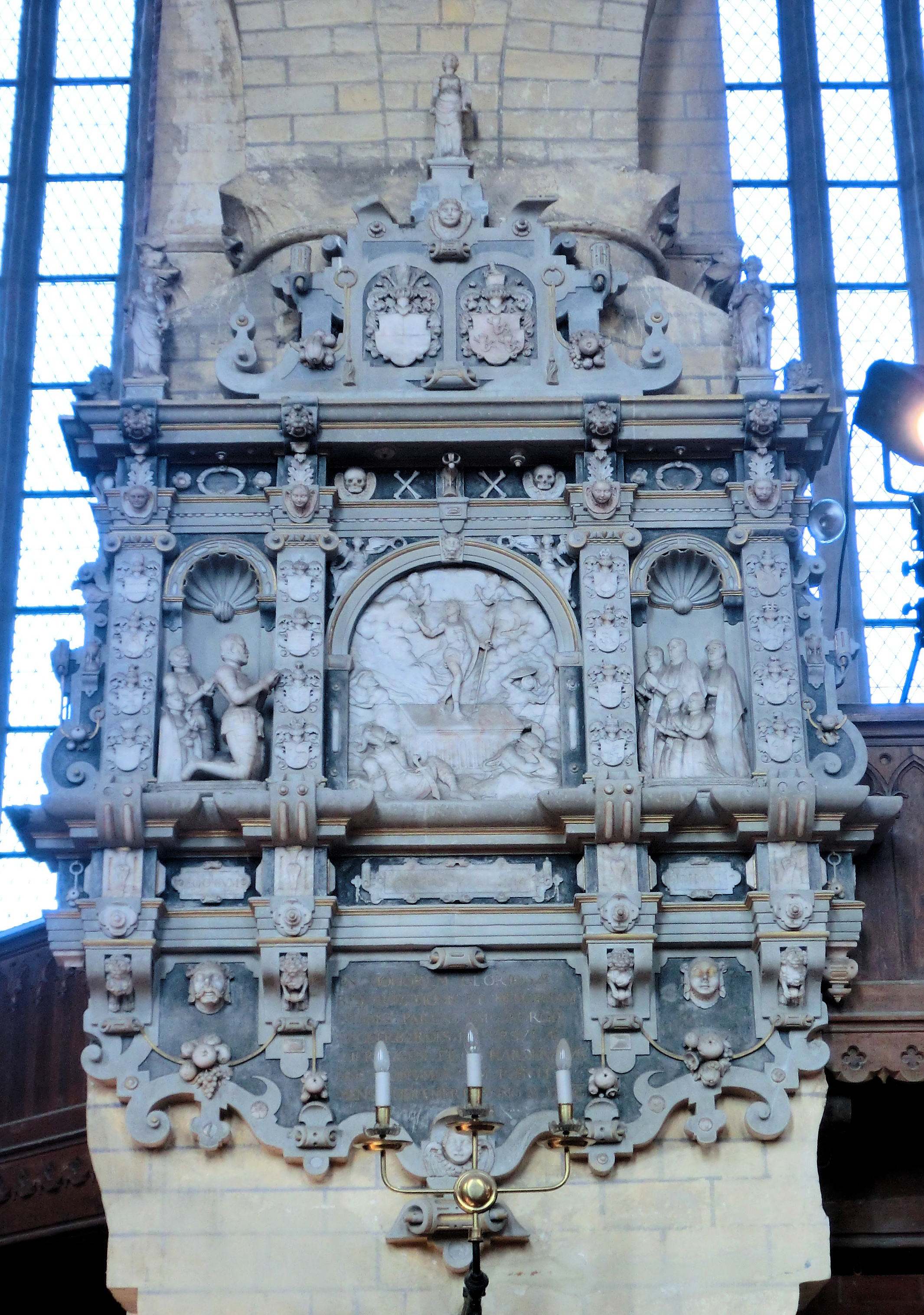 Bützow Stiftskirche: Epitaph, "welches "Hardenack Wackerbart dem Gedächtniss seines Vaters Jürgen Wackerbarth und seiner Mutter Ursula Viereggen im Jahre 1590 setzen liess". Jürgen (Georg) Wackerbarth (1506-1586) aus dem Lauenburger Uradelsgeschlecht war Stiftshauptmann zu Bützow, geheimer Rat der Herzöge Heinrich und Ulrich von Mecklenburg, Oberhauptmann des Stifts Ratzeburg und Gutsherr zu Sterley (bei Ratzeburg). Sohn Hardenack (auf dem Epitaph links hinter dem Vater kniend) war Gutsherr auf Katelbogen und Moisall, verheiratet mit Anna von Bülow-Pokrent. Seine Mutter Ursula (von) Vieregg aus dem Hause Weitendorf war die Tochter des Gundenaker von Vieregg und der Dorothea von Bützow. Sie kniet rechts, umrahmt von vier Töchtern, die beiden jüngeren früh verstorben, die älteste, Elisabeth (vereiratet mit Joachim von Stralendorff), die zweite, Anna (verheiratet 1582 mit Ulrich von Bülow auf Prützen).